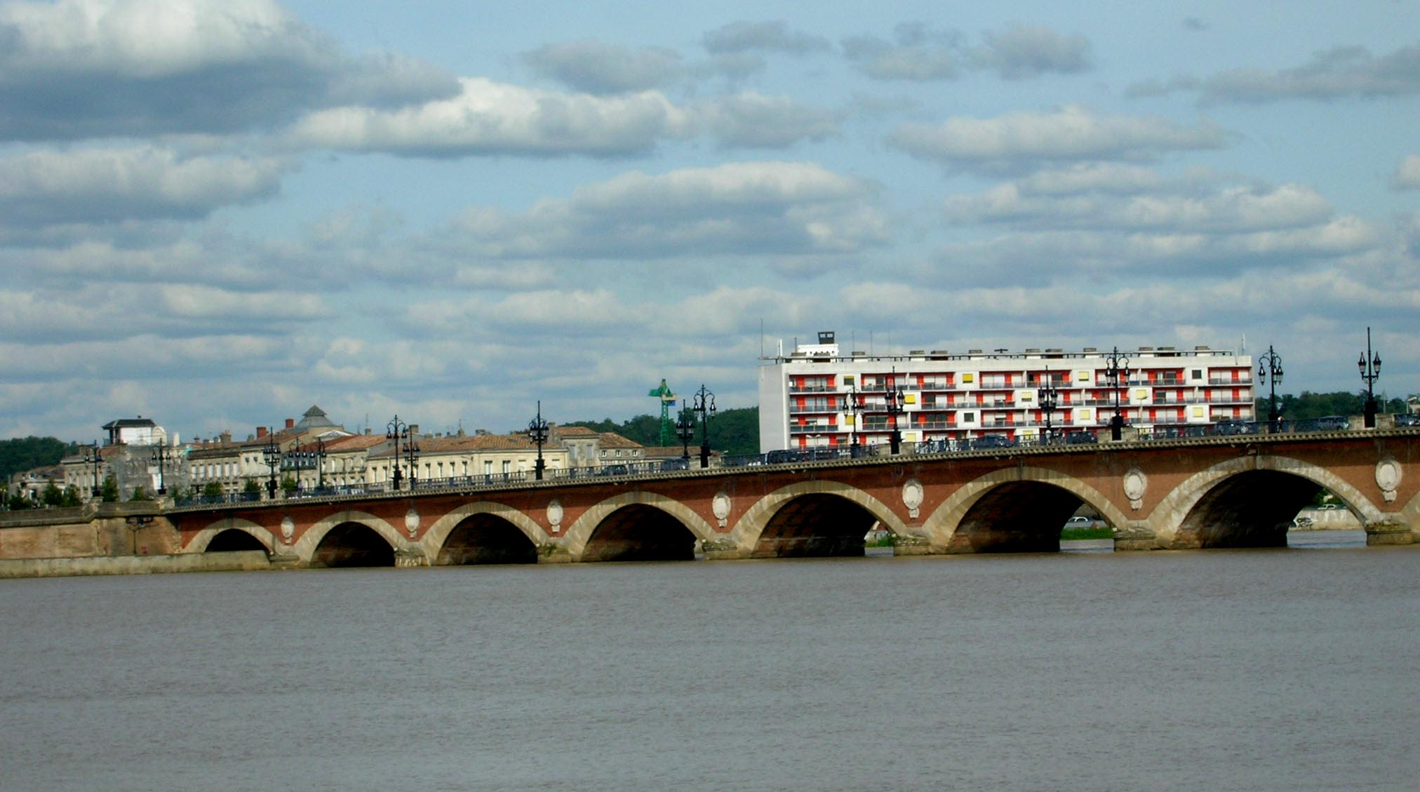 Pont de Pierre (Stenge Bréck) vu Bordeaux